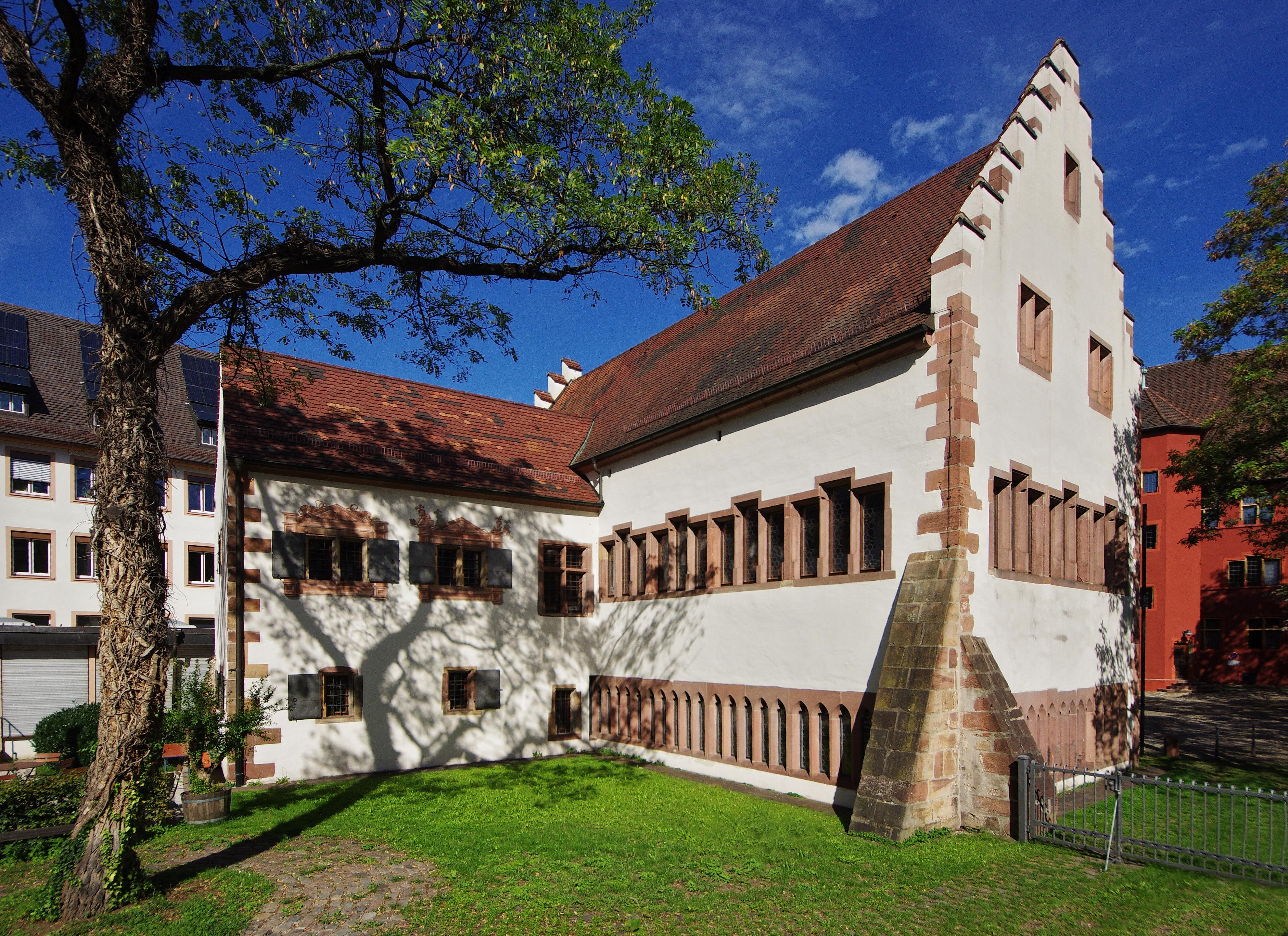 Die Gerichtslaube, das älteste Rathaus Freiburgs.